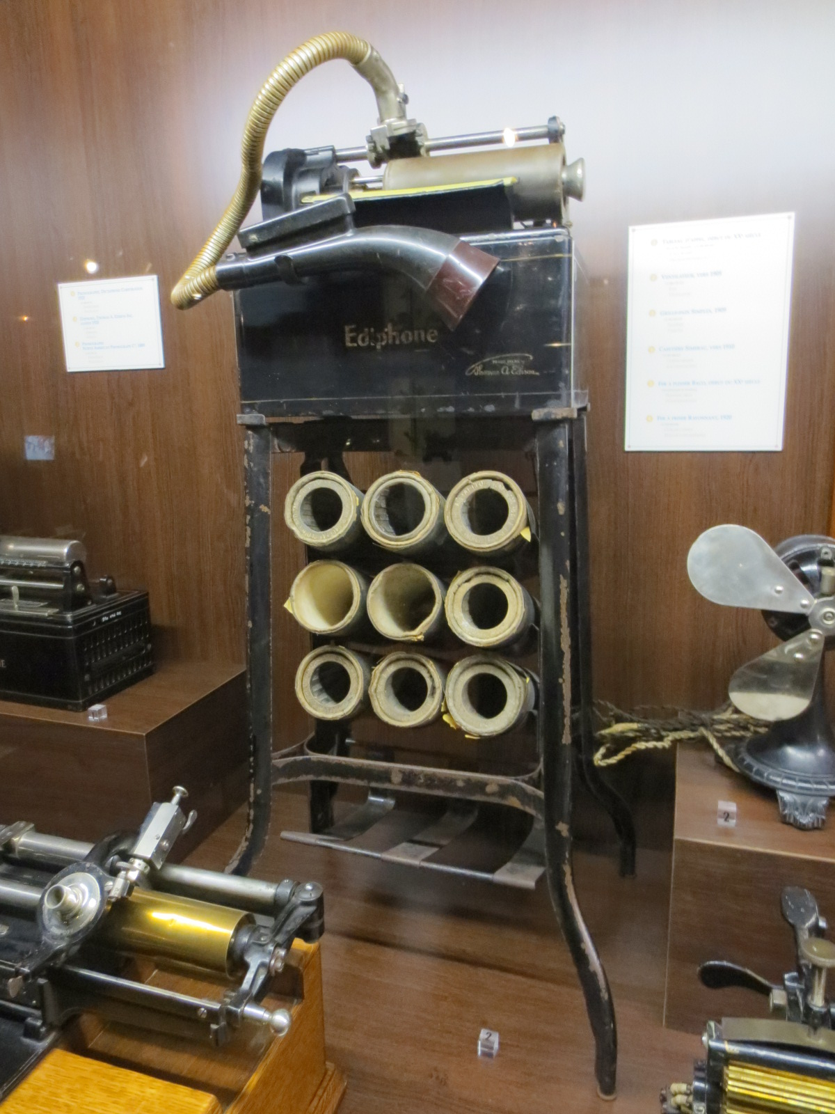 Musée EDF Electropolis : Ediphone de Thomas Edison ( dictaphone ) années 1920